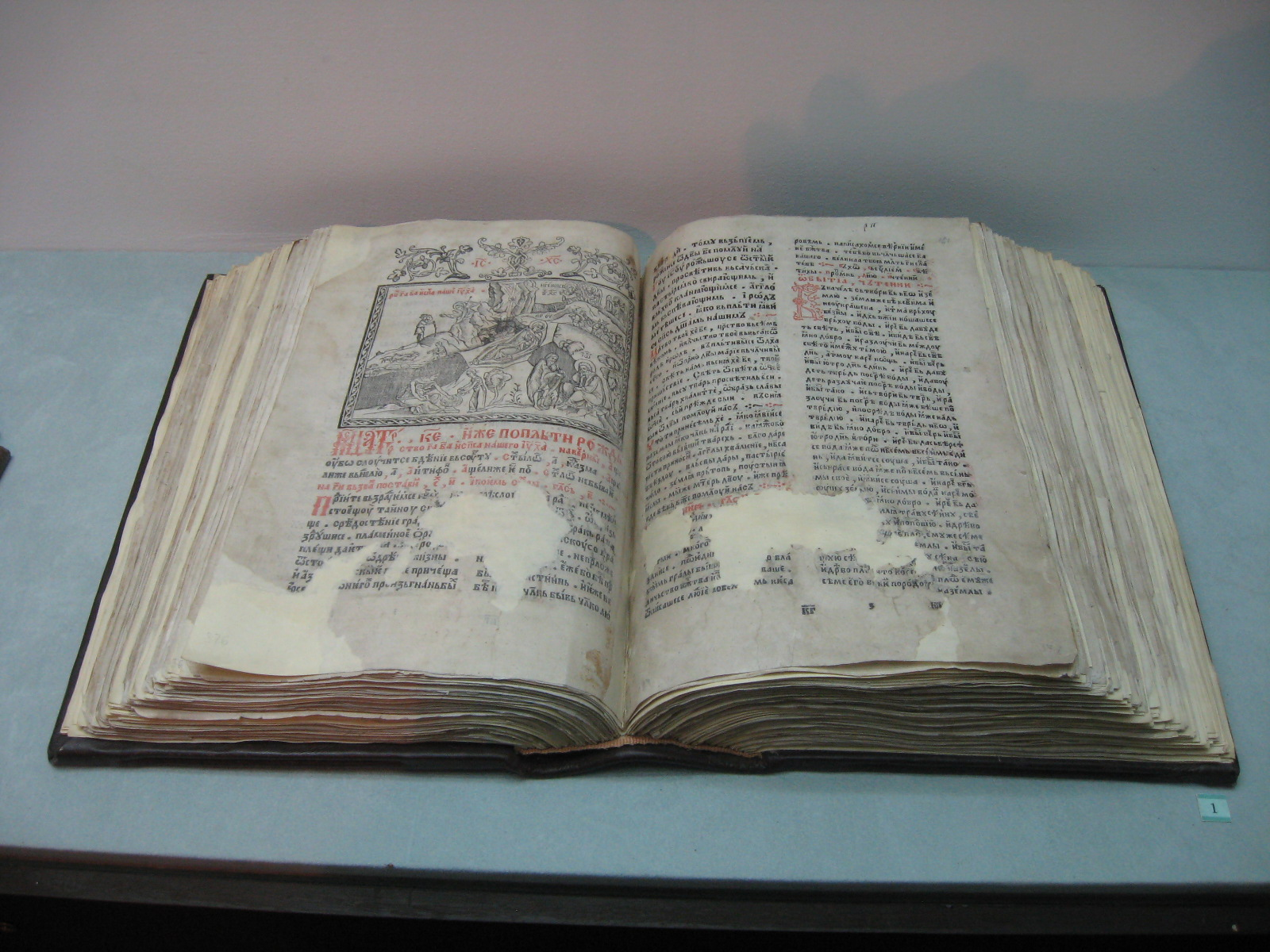 Рукописно четверојеванђеље, вероватно 14. век, ризница манастира Јежевица.